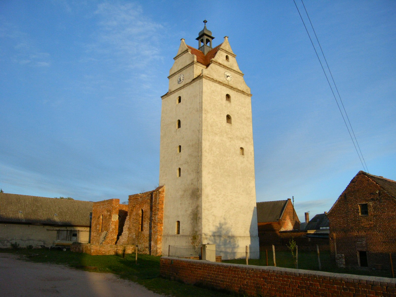 Schierauer Kirche